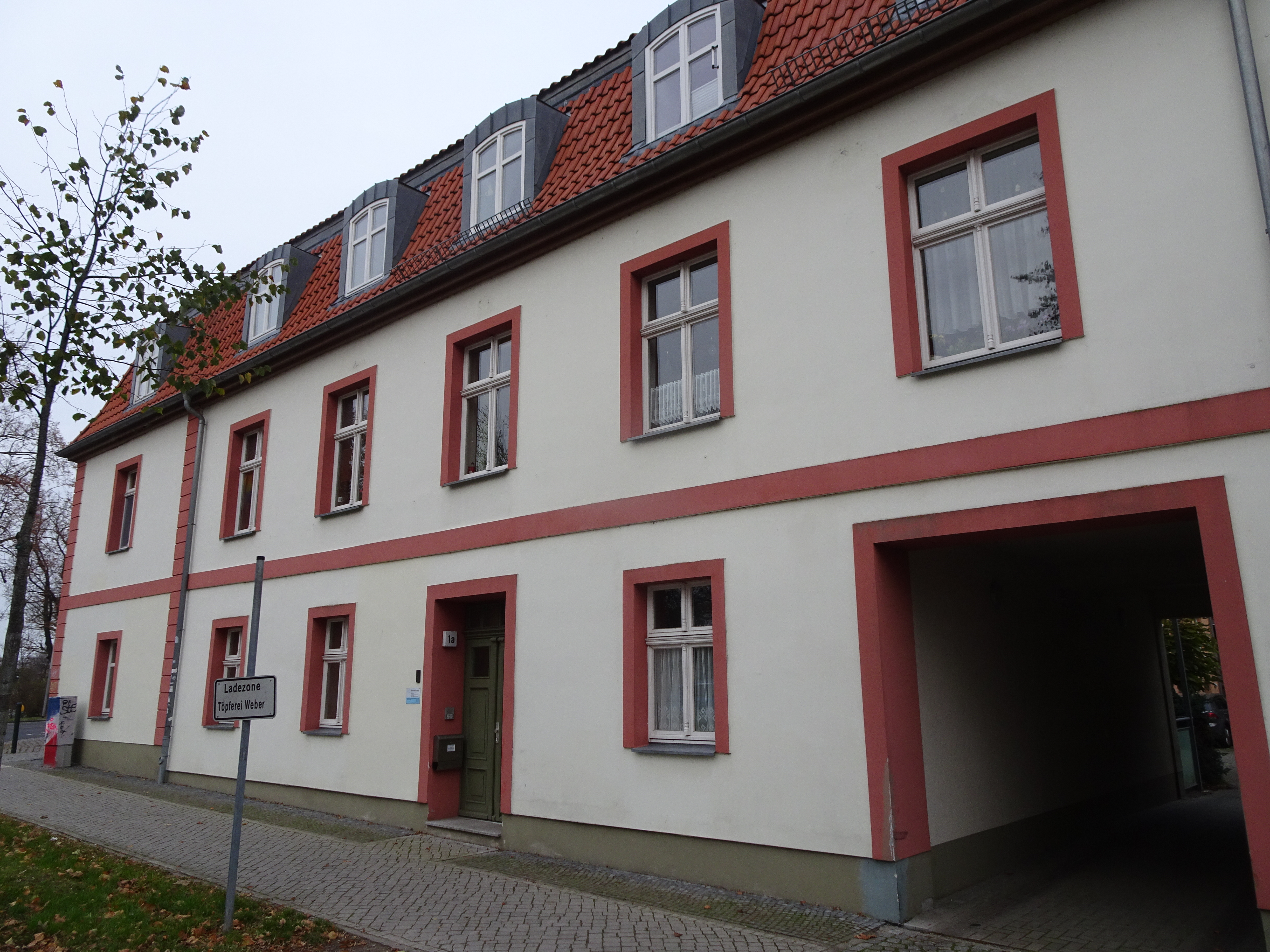 Gebäude Knieperwall 1a in Stralsund